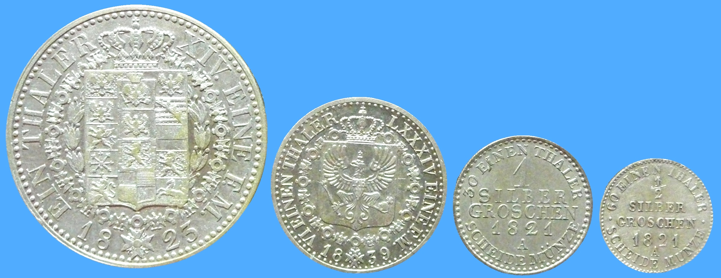 Königreich Preußen Friedrich Wilhelm III. König von Preußen 1797-1840 Münzprägung gemäß Gesetz über die Münzverfassung in den preußischen Staaten vom 30. September 1821 Rückseite der Kurantmünzen 1 Taler und 1/6 Taler im 14-Taler-Münzfuß und Scheidemünzen 1- und 1/2-Silbergroschen im 16-Taler-Münzfuß